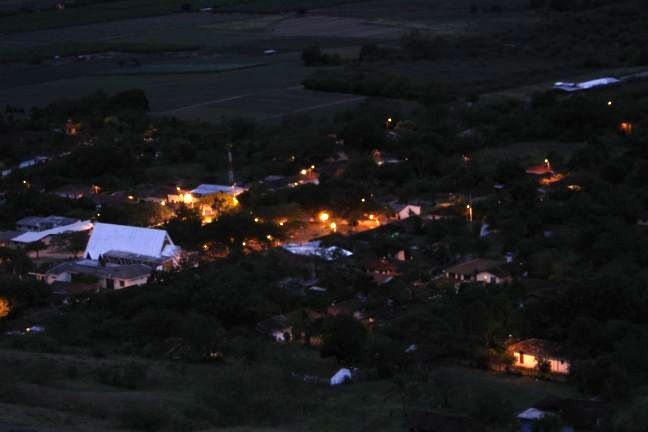 panorama desde la Lomita de Ricaurte, municipio de Bolívar, Valle del Cauca, Colombia